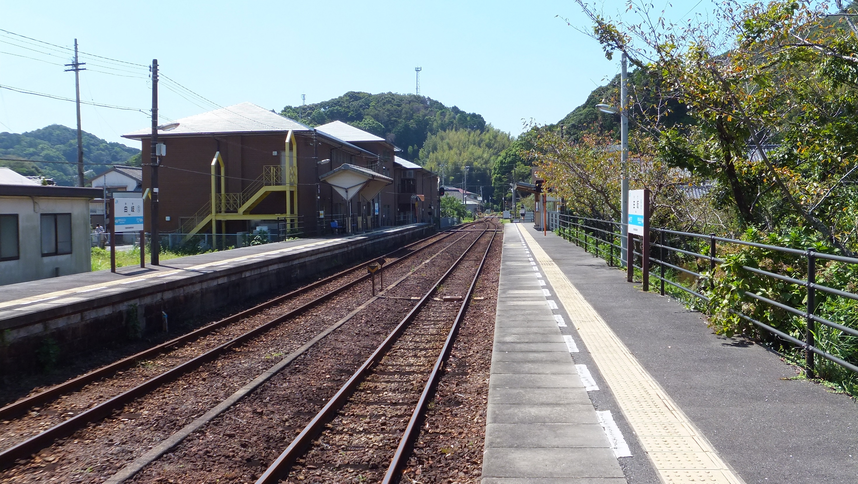 JR牟岐線 由岐駅 プラットホーム 阿波福井方より（徳島県海部郡美波町 2015年）